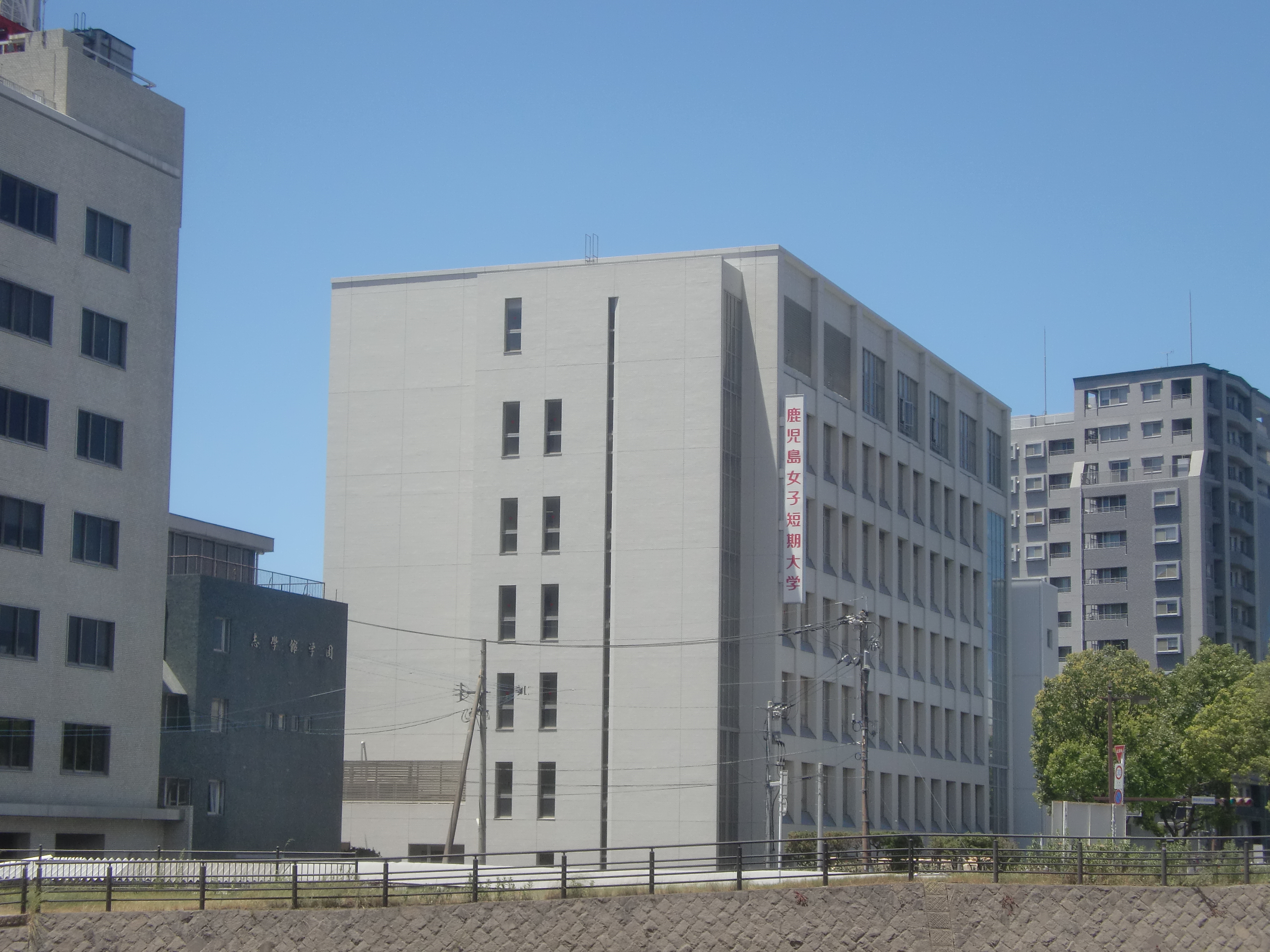 鹿児島女子短期大学の外観